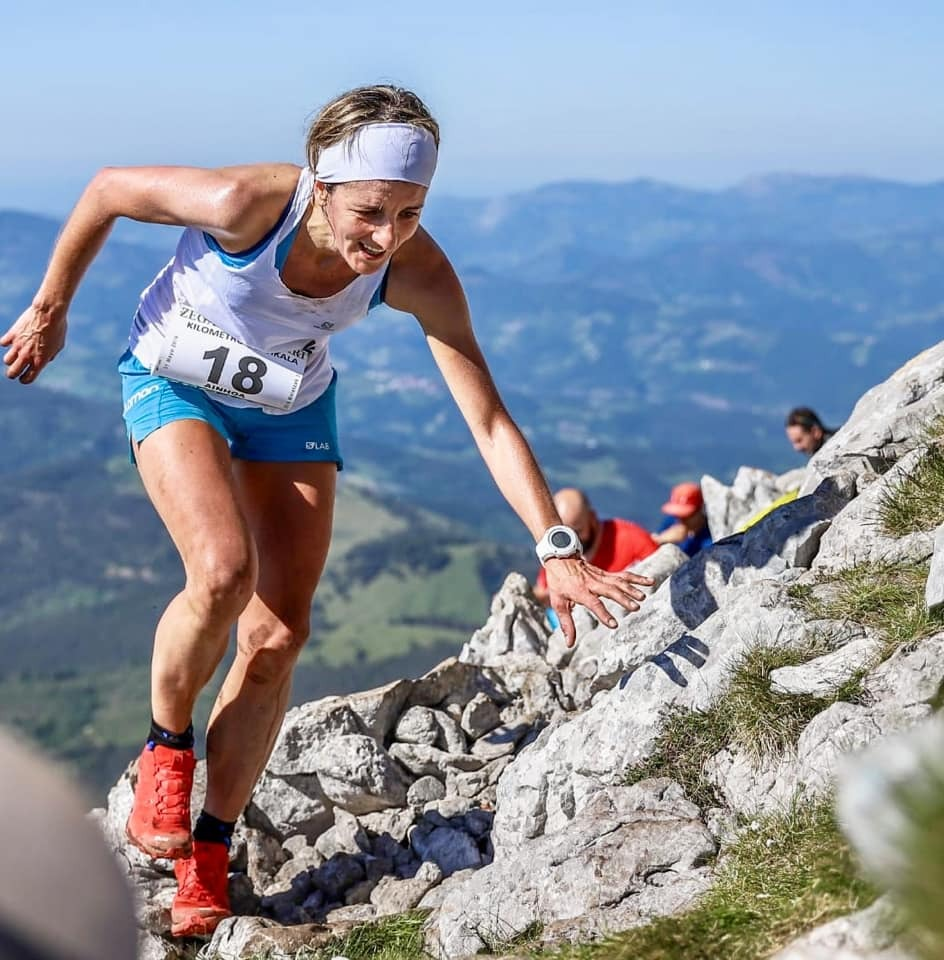 Ainhoa Lendinez in Zegama-Aizkorri 2019. Photo: Igor Quijano